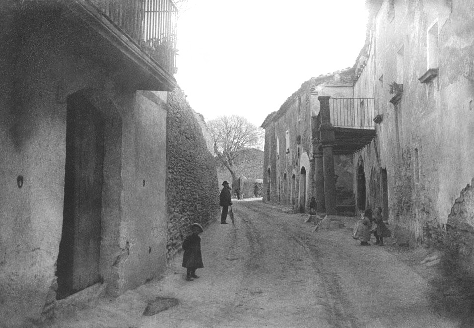 Imatge